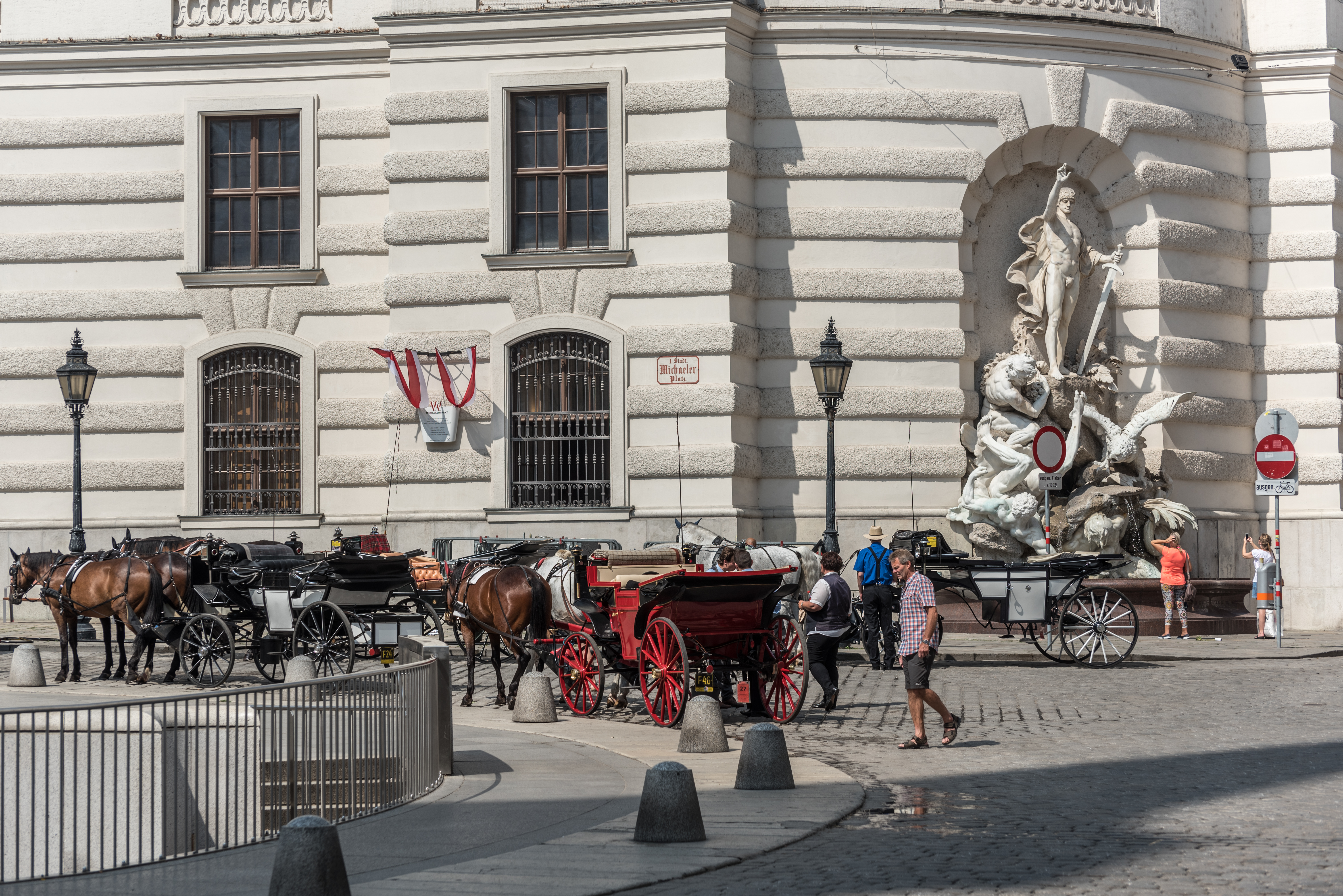 Wien, Hofburg, Michaelertrakt